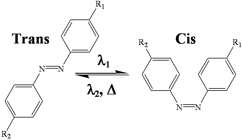 Photoisomérisation de dérivés de type azobenzène. Auteur : Frédéric Chaput, réalisé avec un programme de dessin. Licence GFDL Frédéric Chaput